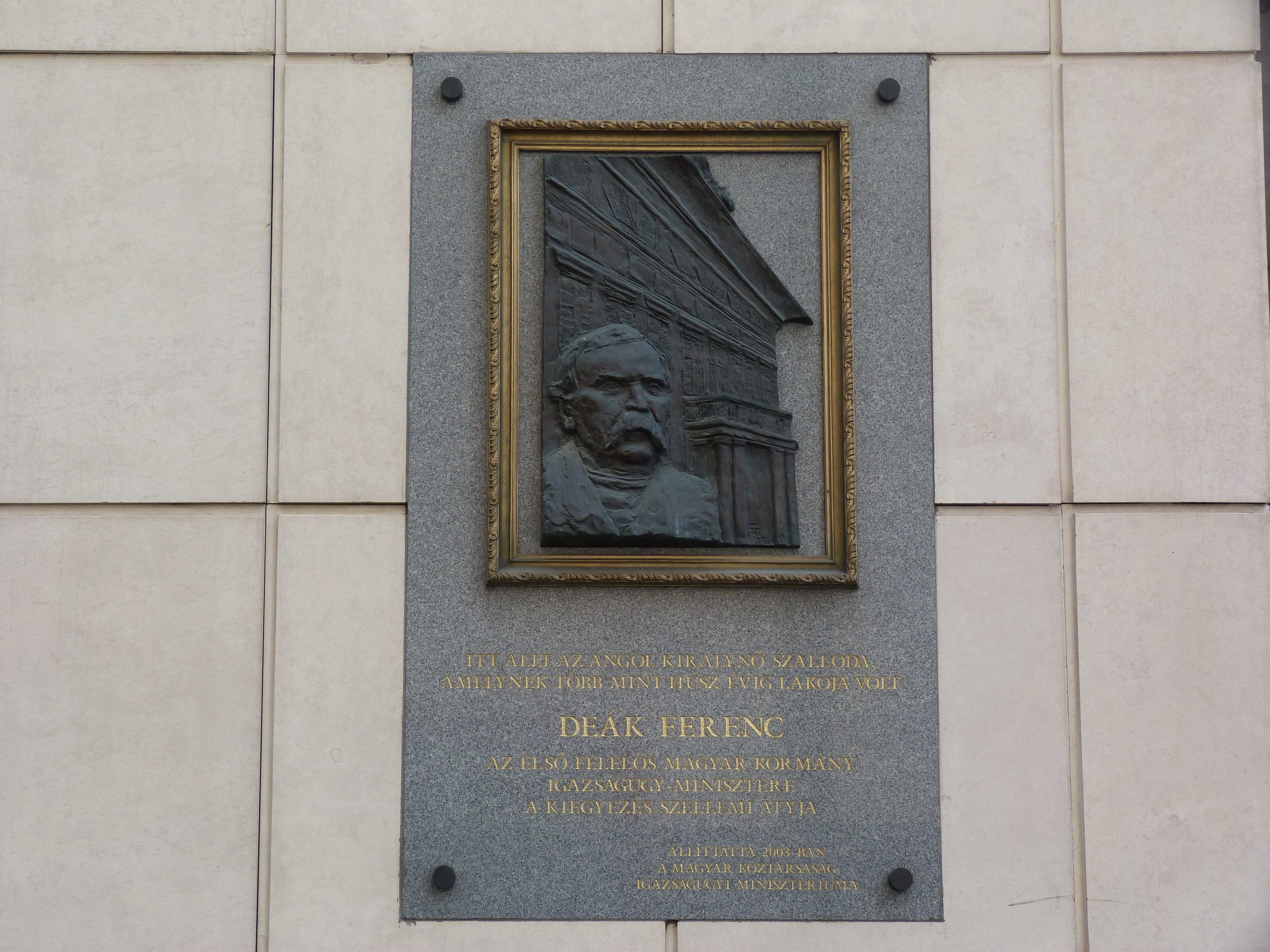 A felvétel 2012. május 19 -én készült Budapesten. Deák Ferenc emléklapja az Angol Királynő Szálloda helyén álló ma Deák Ferenc utca 1 szám alatti ház falán.